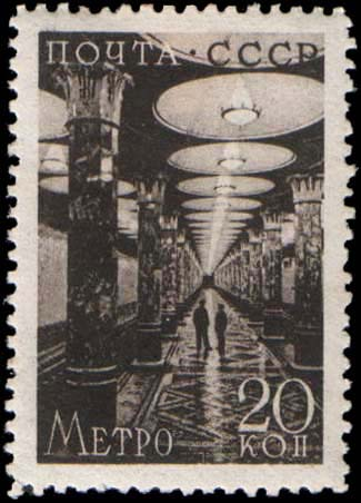 Почтовая марка СССР, ЦФА № 636, «Ст. м. Киевская».